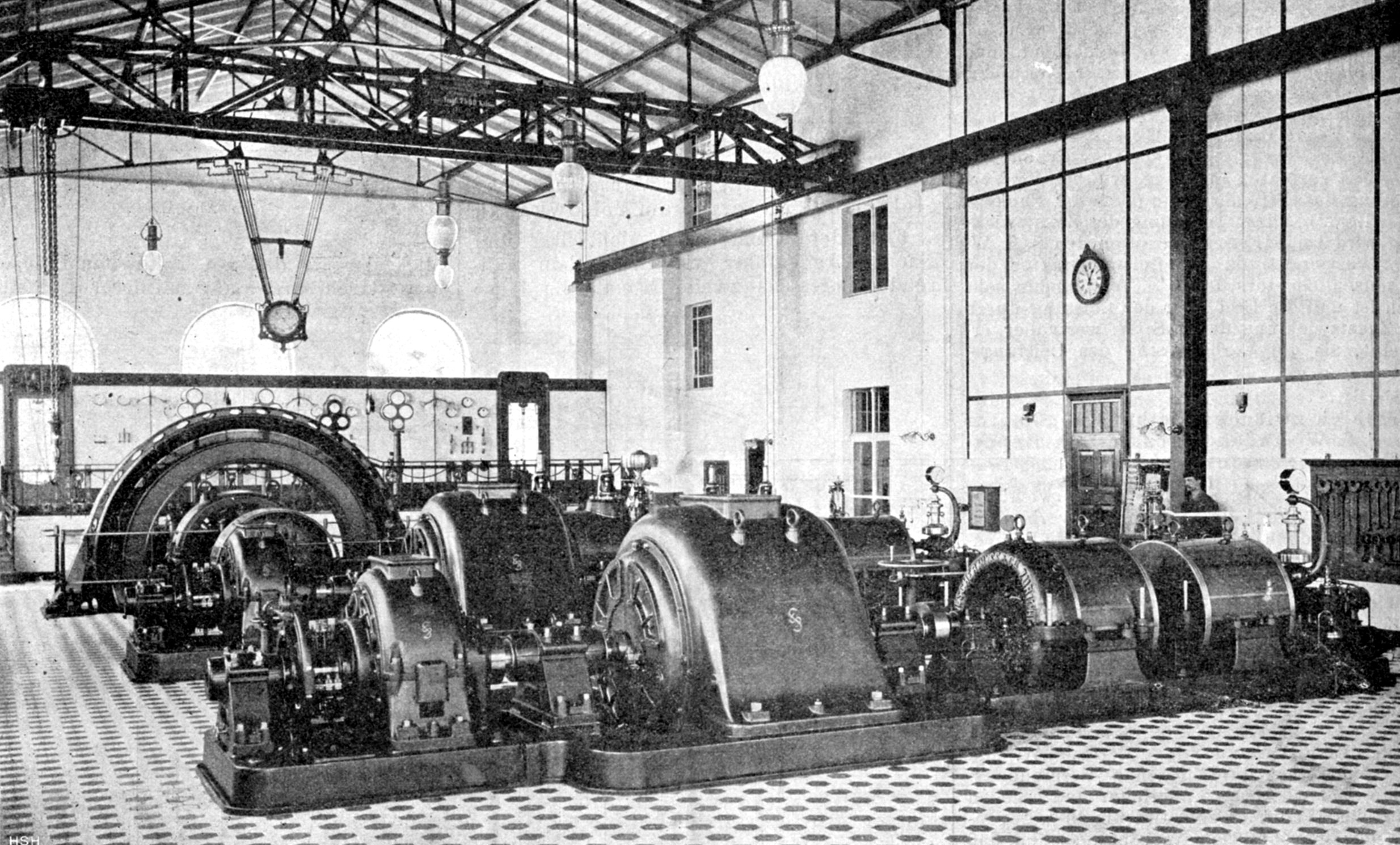 Kraftwerk Teltowkanal in Berlin-Zehlendorf, Maschinensaal